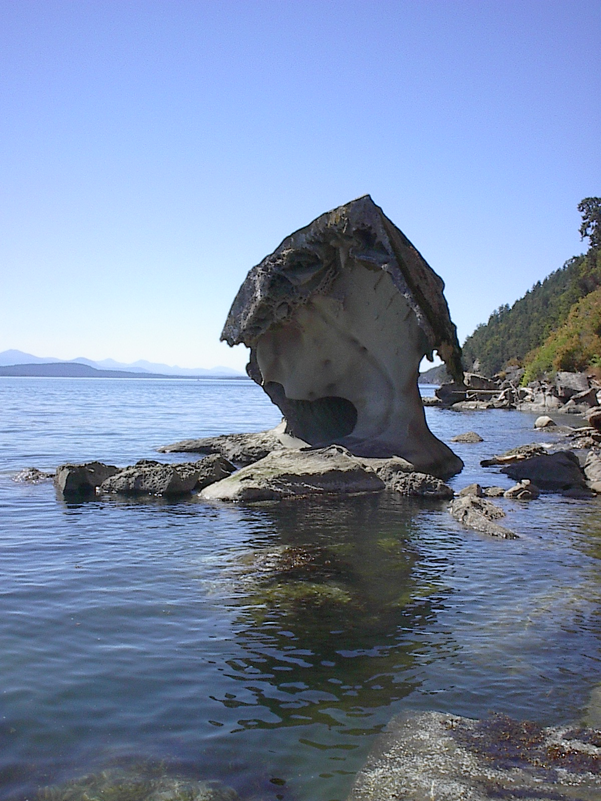 Isla Galiano, Roca cono una Seta